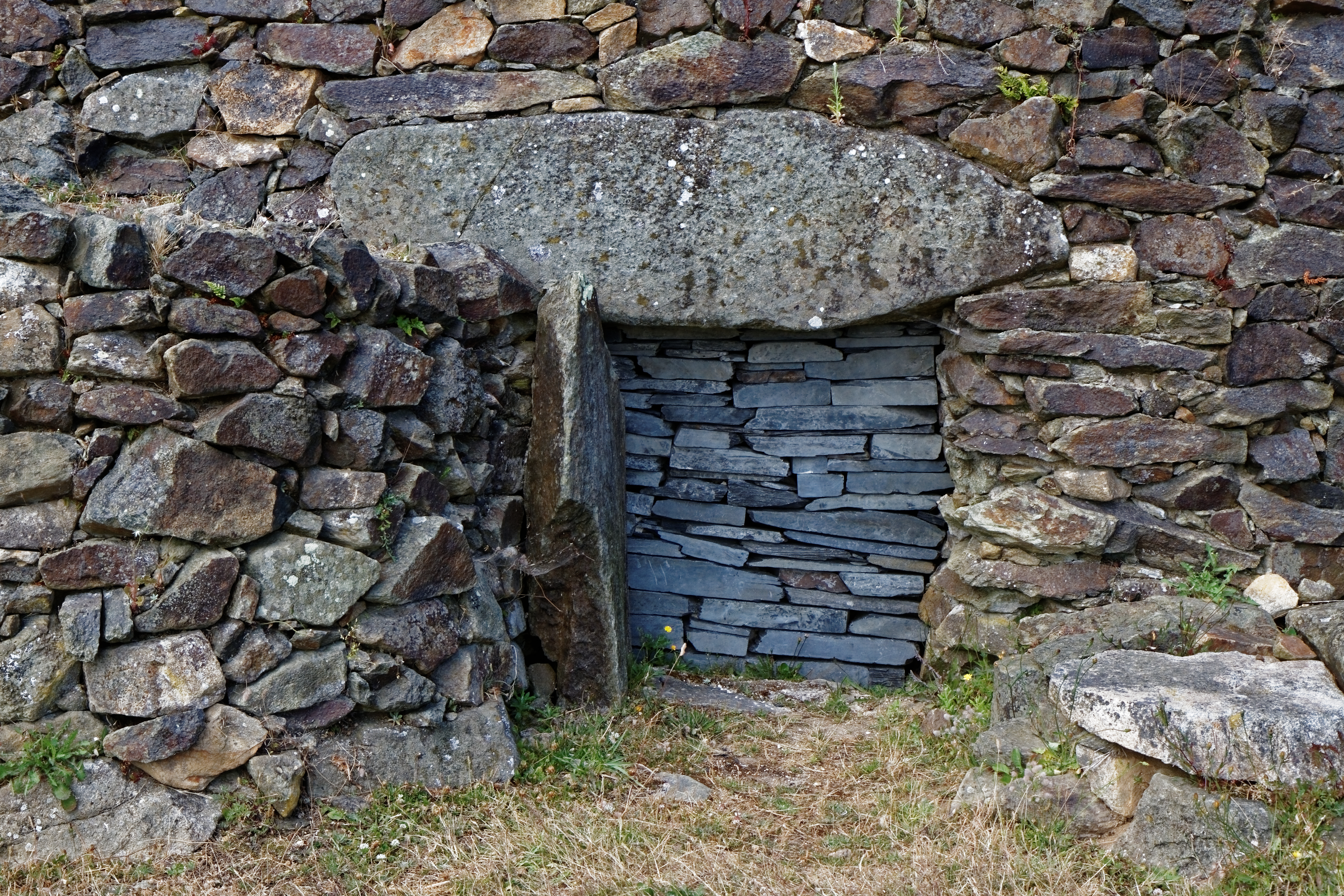 Panorama du Cairn de Barnenez à Plouezoc'h dans le Finistère. .